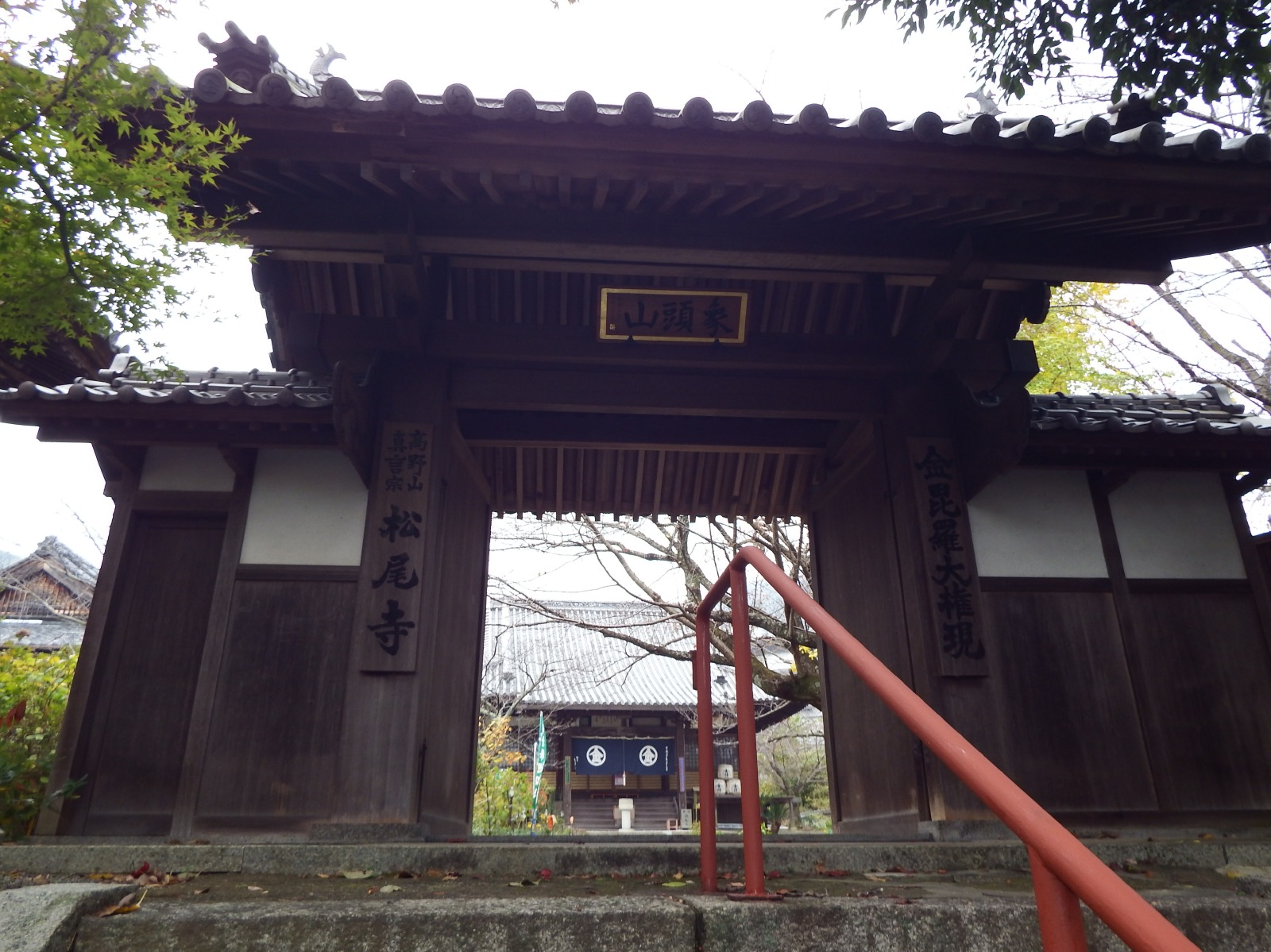 松尾寺の山門